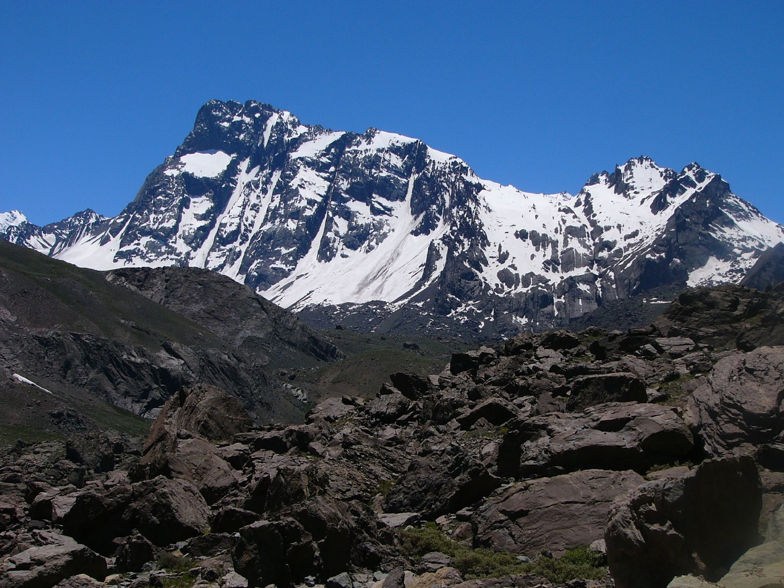 Cerro Arenas, Andes, Chile.